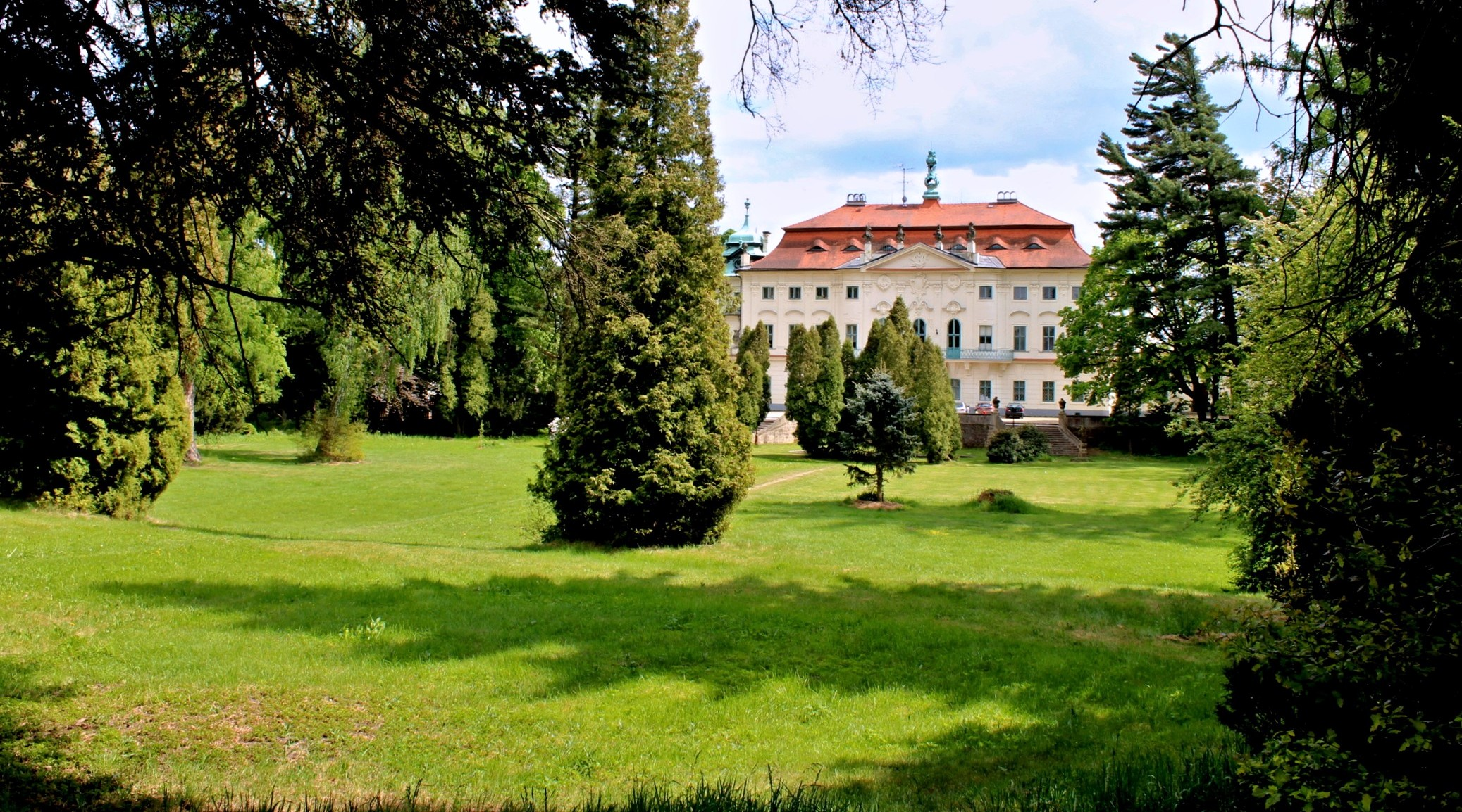 Zámek Nový Falkenburk v Jablonném